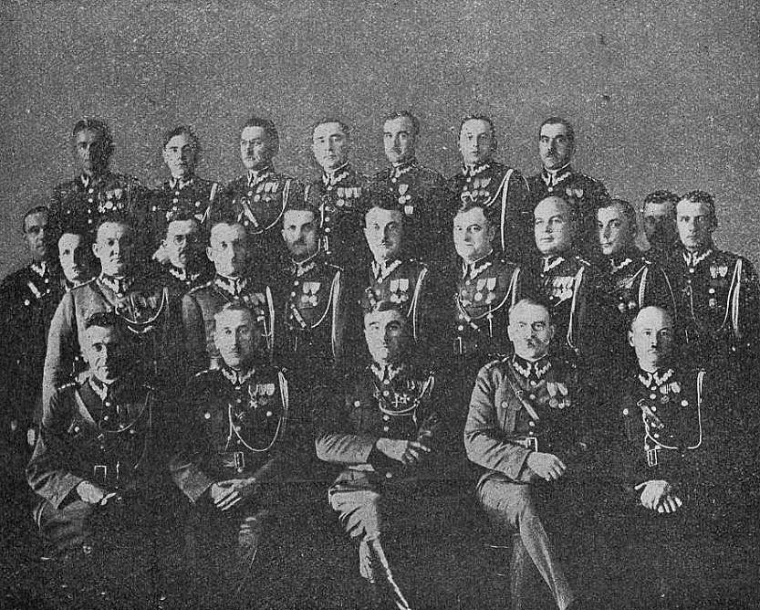 Kadra oficerów Centrum Wyszkolenia Żandarmerii (1931). Siedzą od lewej: kpt. Karol Józef Pulda, mjr Feliks Józef Choynowski, mjr Stanisław Sitek (komendant CWŻ, mjr lekarz dr Kazimierz Rytter, kpt. Zygmunt Seweryn Somogyi. Stoją w środku: ppor. Józef Pobidyński, kpt. Jan Stanisław Bednarski, kpt. Stanisław Wincenty Roszkiewicz, kpt. Tadeusz Marian Barbacki, kpt. Henryk Bolesław Kruczek, kpt. Jan Józef Rybowski, por. Franciszek Karol Gocko, kpt. Witold Czesław Matz, Witold Jan Szerszeniewicz, por. Adam Kirchmayer, Henryk Ludwik Malion, por. żand. Tadeusz Nisiewicz-Dobrzański. Stoją u góry: por. Stefan Roman Radyk, por. Antoni Kostrzewa, por. Pracki, por. Kiełkowski, por. rez. art. Łukowski, por. Miechurski, por. adm. Kamiński.